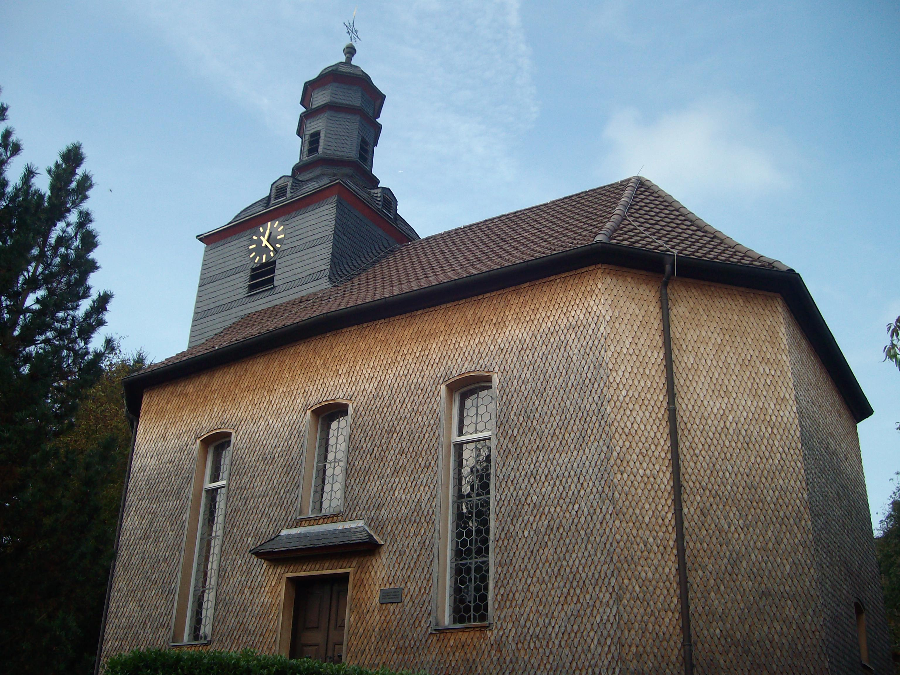 Südseite der Evangelischen Kirche Lauter, Laubach, Landkreis Gießen, Hessen, Deutschland